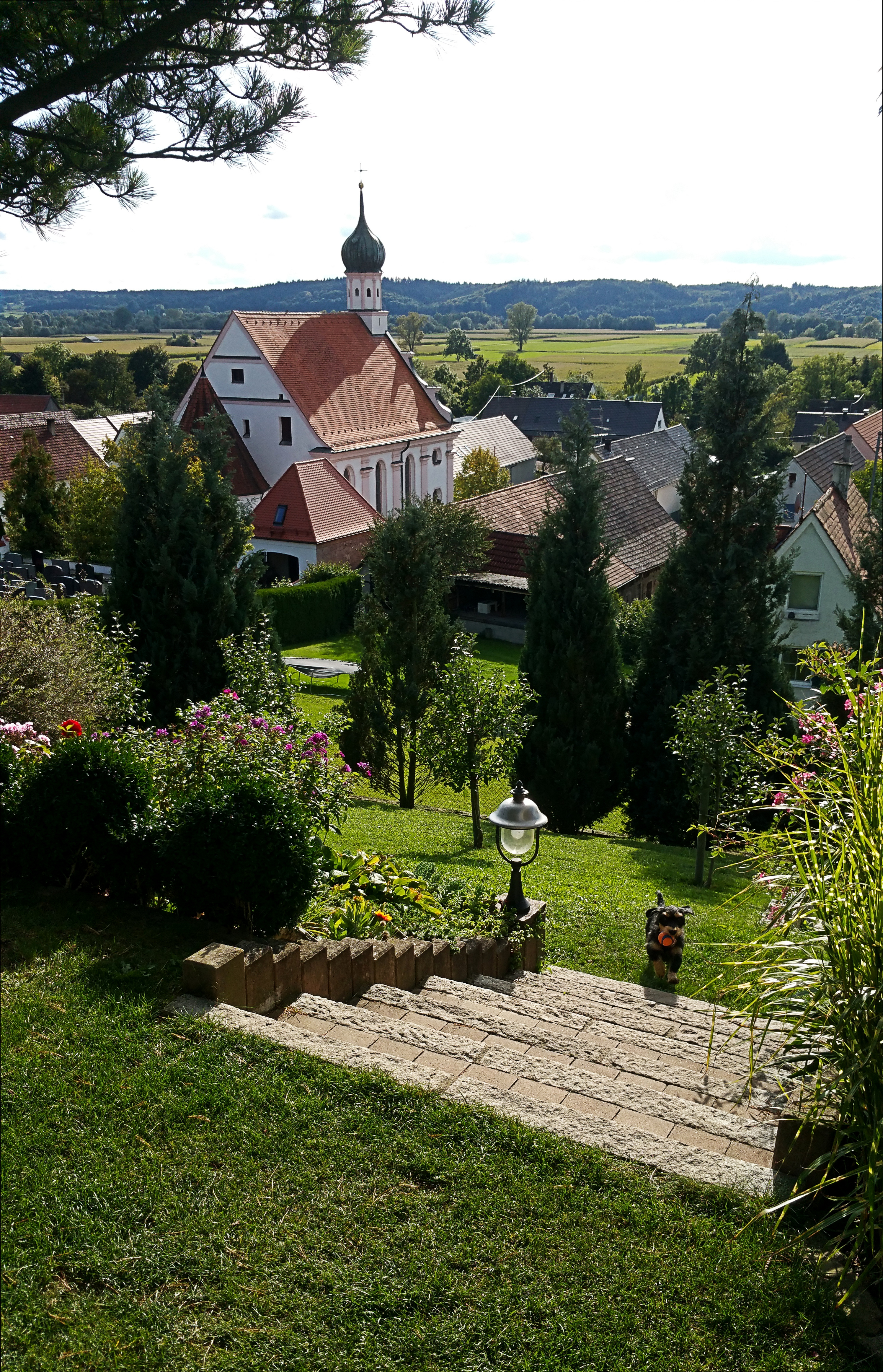 Münsterhausen im Landkreis Günzburg, Katholische Wallfahrtskirche "Unsere Liebe Frau" von Nordosten gesehen